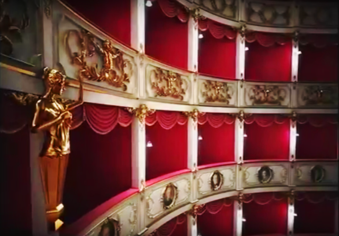 Dari: Teatro Bellini (Acireale)